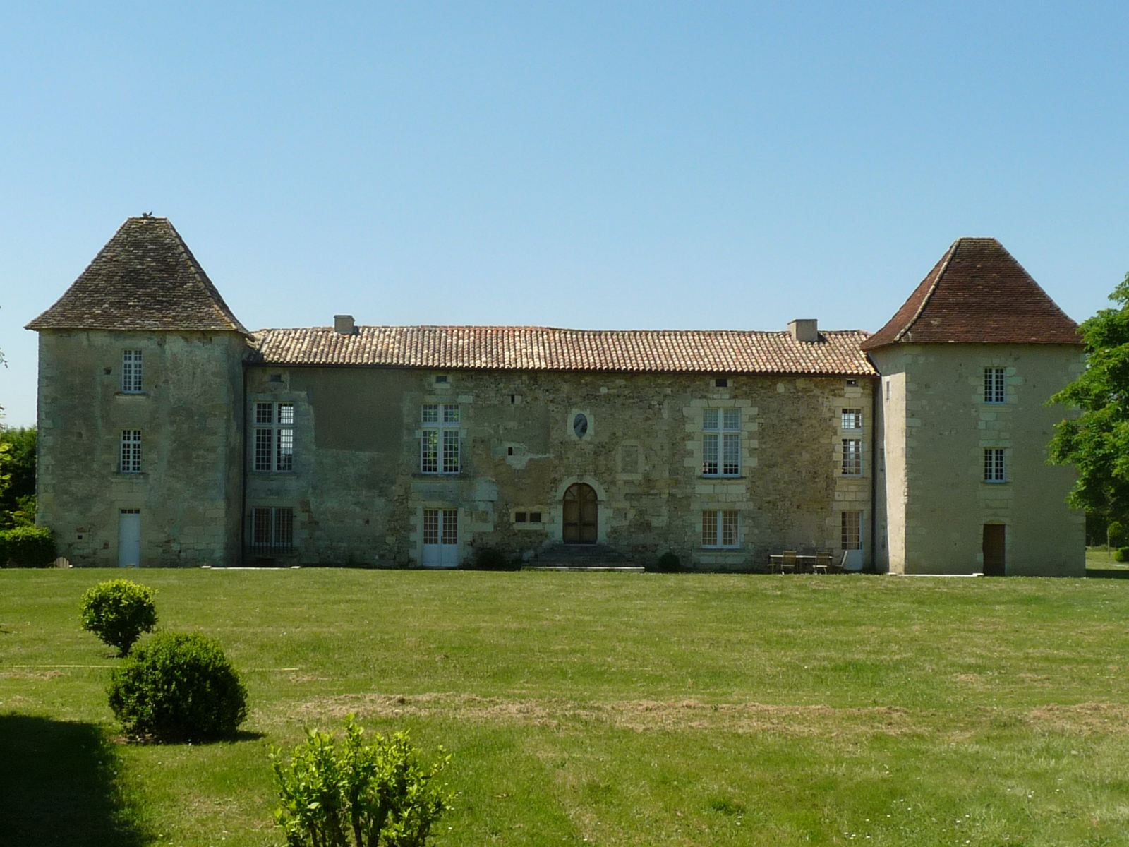 château de Puymangou, Dordogne, France